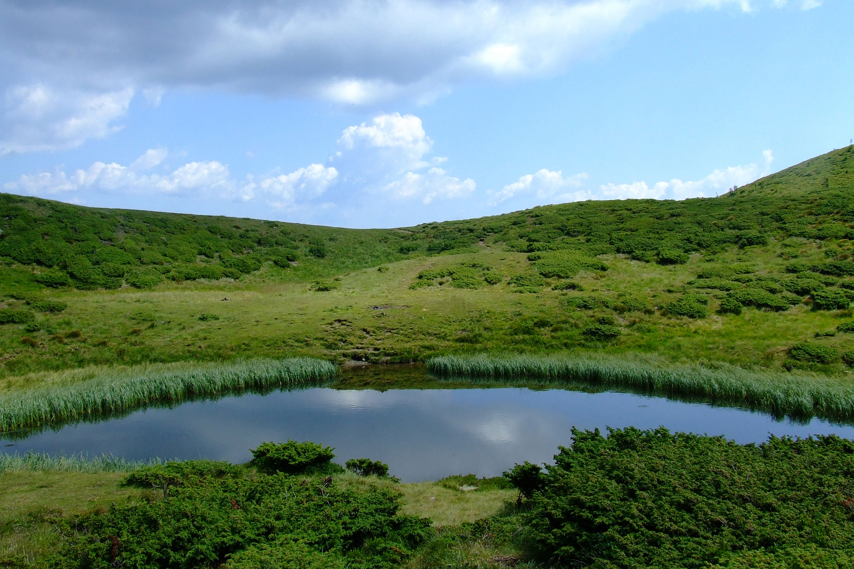 Карпатський біосферний заповідник, Рахівський, Тячівський, Хустський, Виноградівський райони